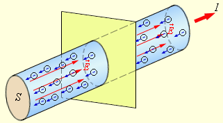 ток постоянный